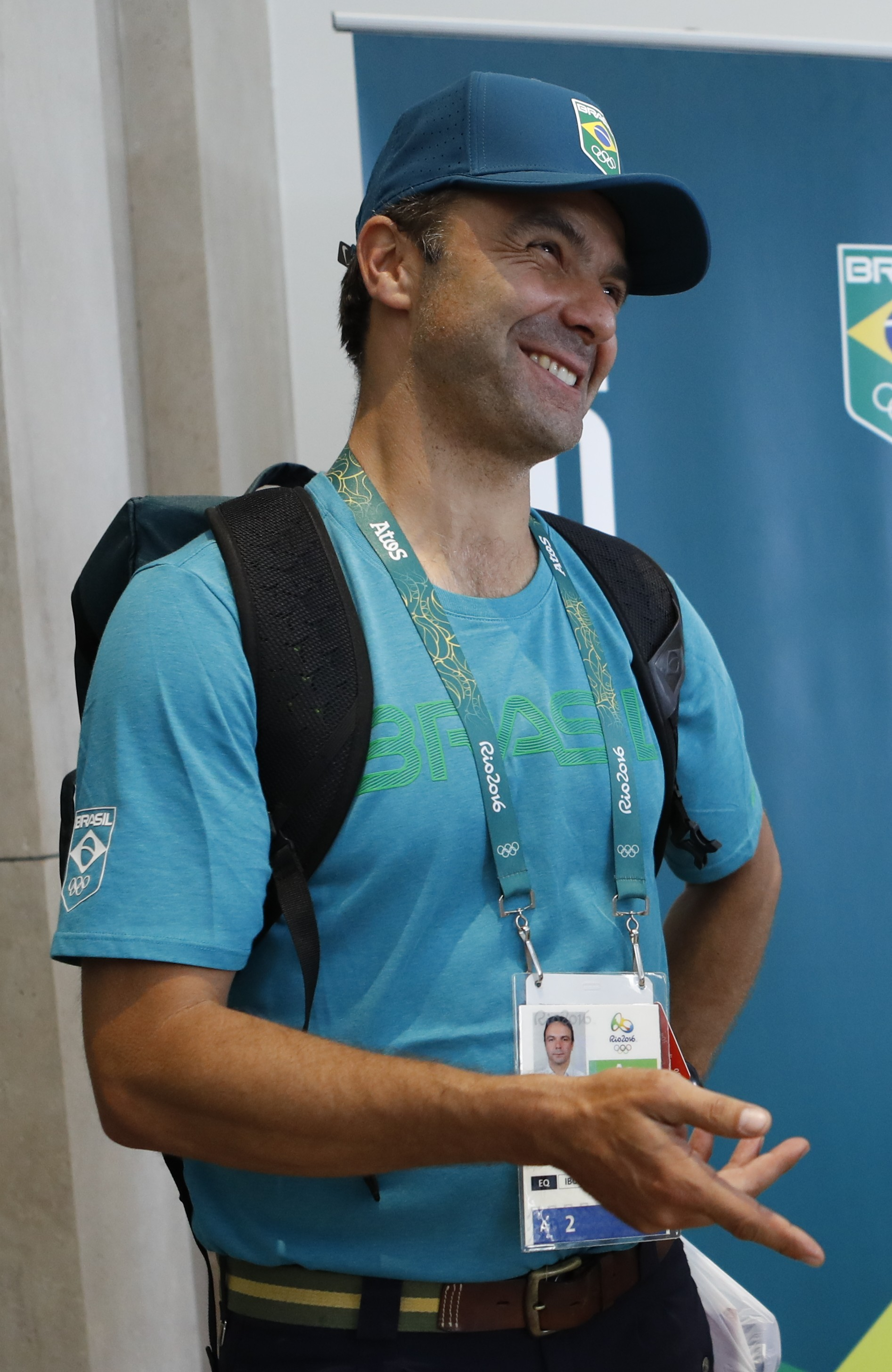 Rio de Janeiro - Ruy Fonseca Filho na Vila Olímpica dos Jogos Rio 2016 (Fernando Frazão/Agência Brasil)